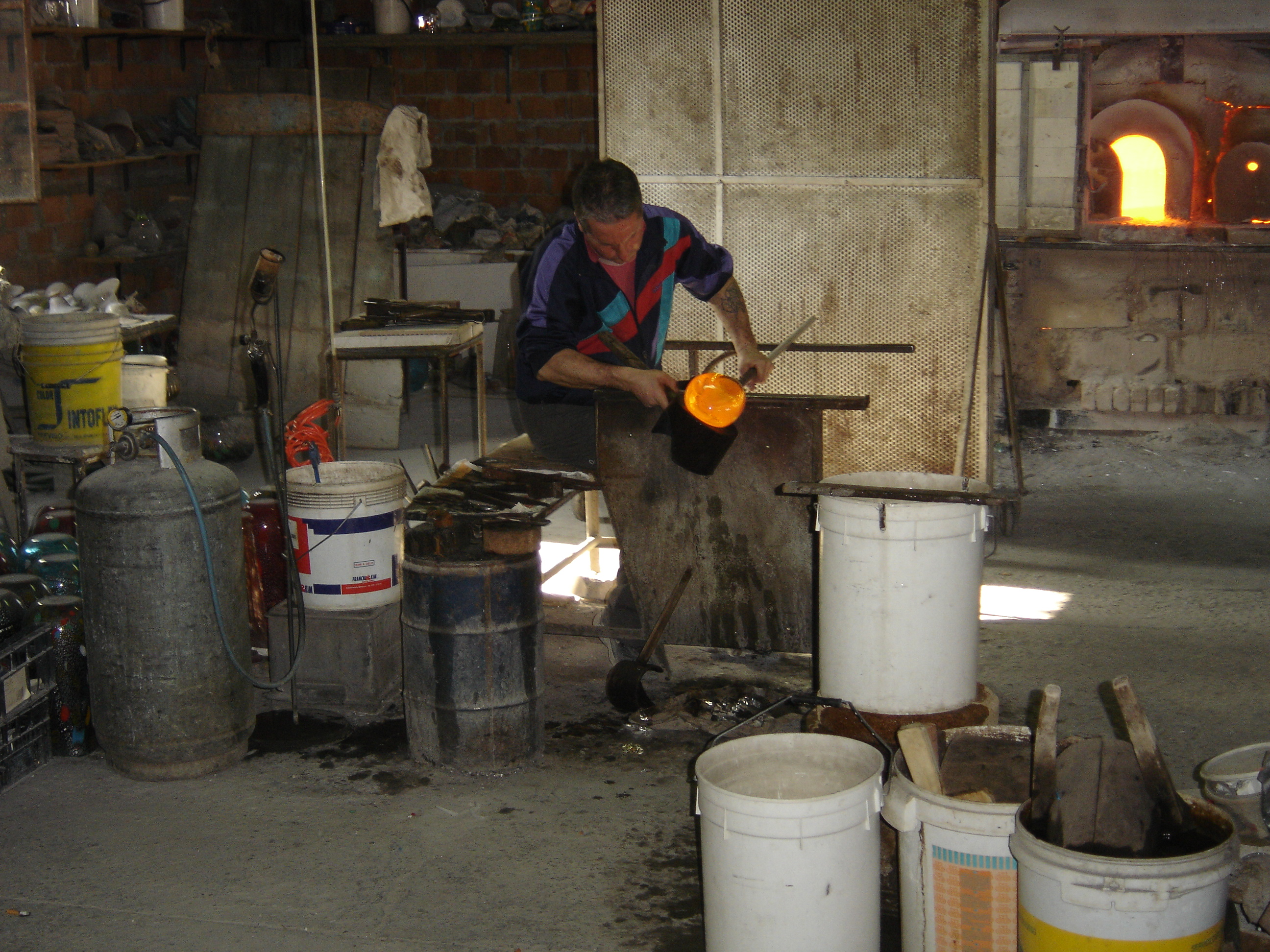 Glass Making, Murano.